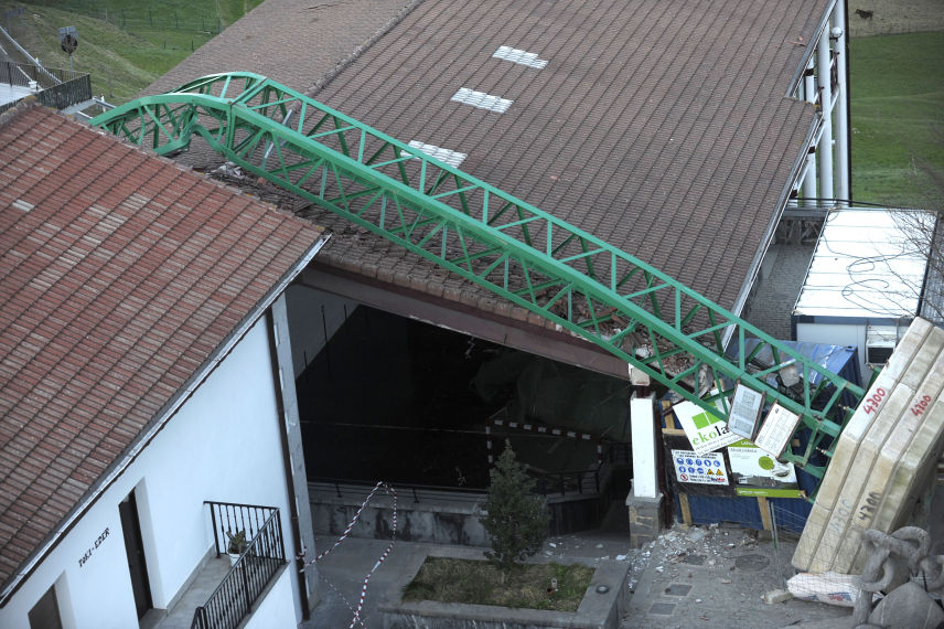 Garabia baten erorketa Abaltzisketan Xynthia ekaitzaren ondorioz